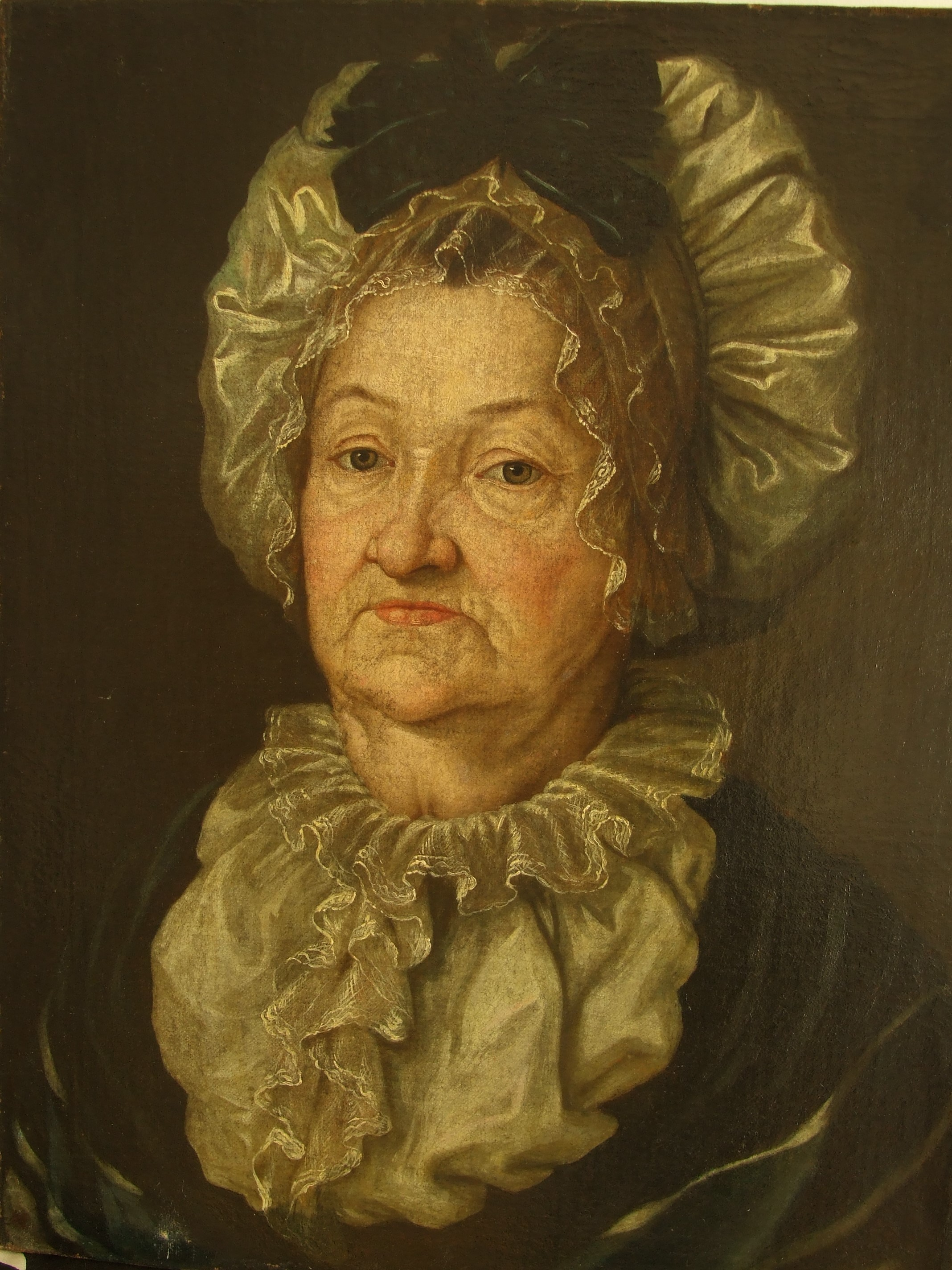 Fotografia portretu Katarzyny Mysłowskiej. Oryginał portretu - archiwum rodziny Mysłowskich.